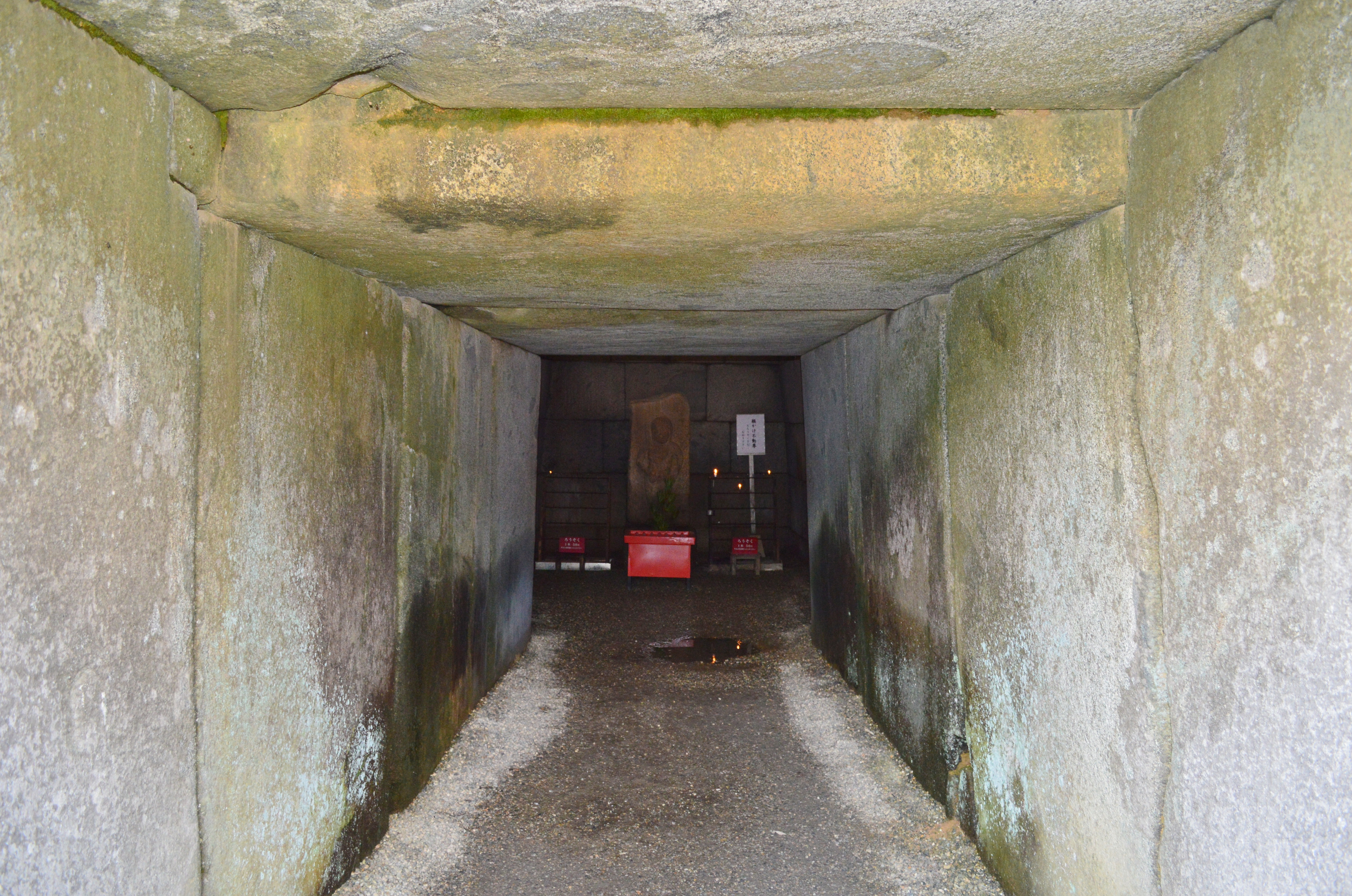 文殊院西古墳 石室羨道